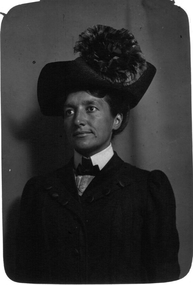 Melle Marvingt, aviatrice